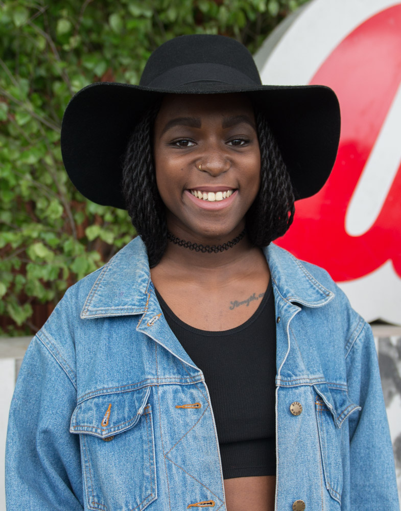 Sabina Ddumba, en av artisterna för Allsång på Skansen presenteras den 10 juni 2015 på Skansen i Stockholm.